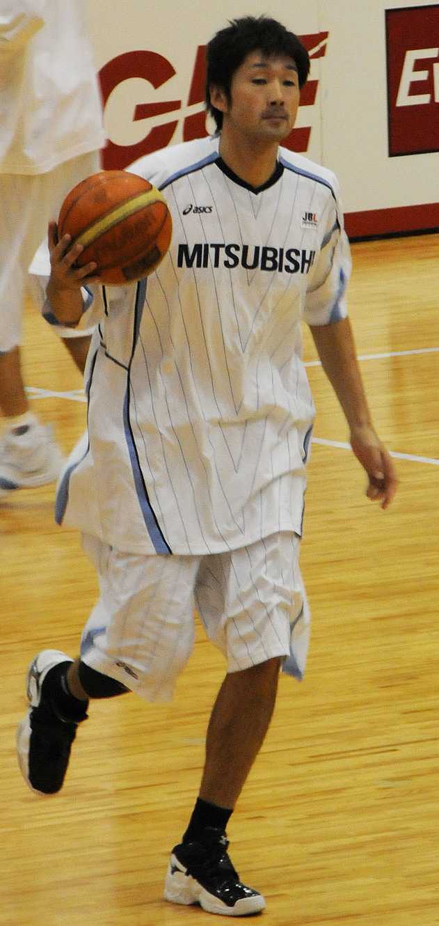 三菱電機ダイヤモンドドルフィンズ、堀田剛司選手。琴丘総合体育館で。